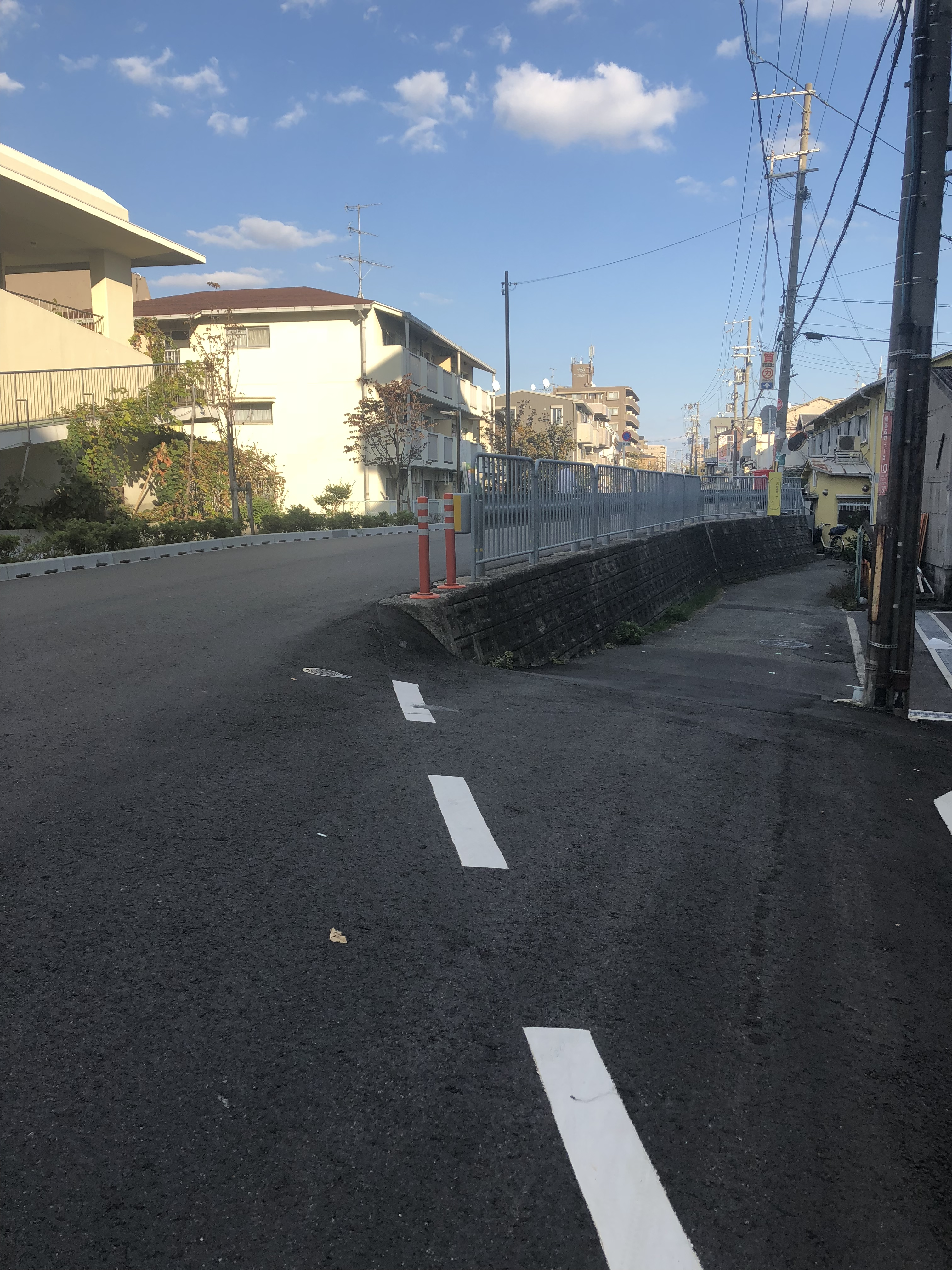 穂積村囲堤の名残